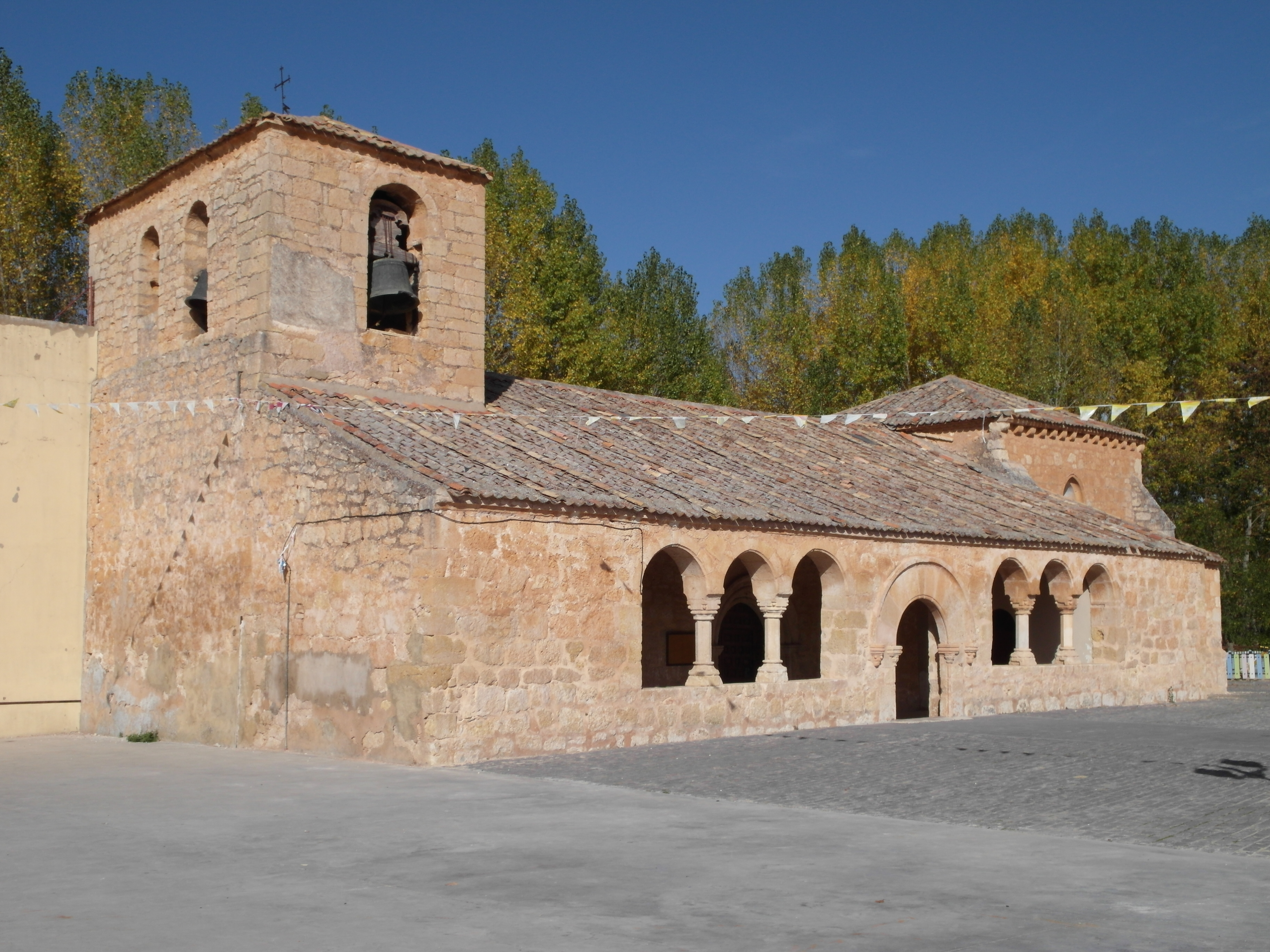 Iglesia de Santa María la Mayor, Peñalba de San Esteban.